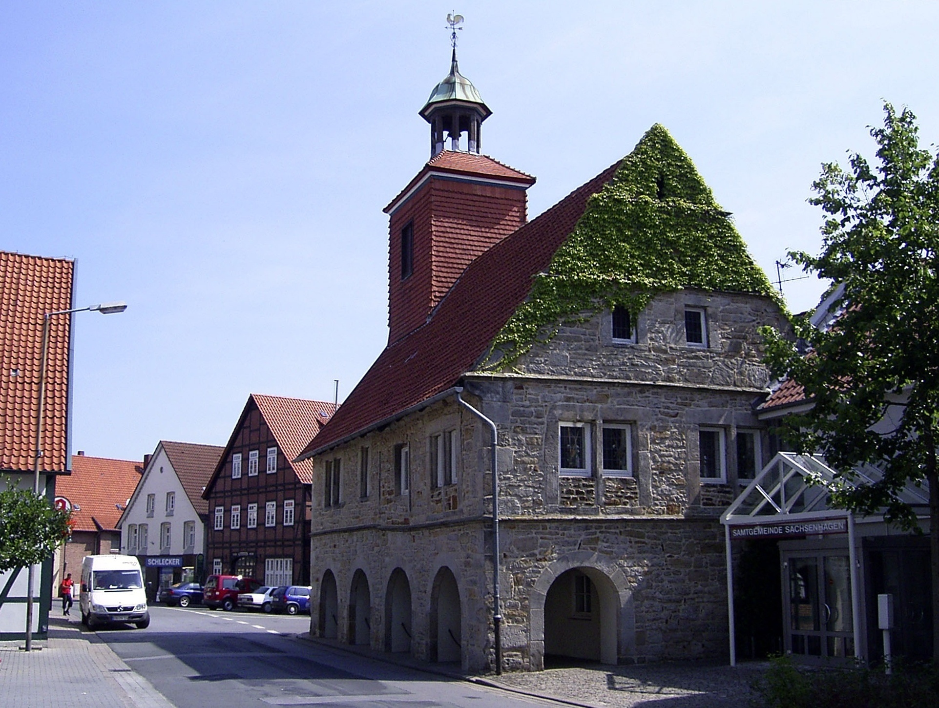 Ratskeller und Rathaus in Sachsenhagen